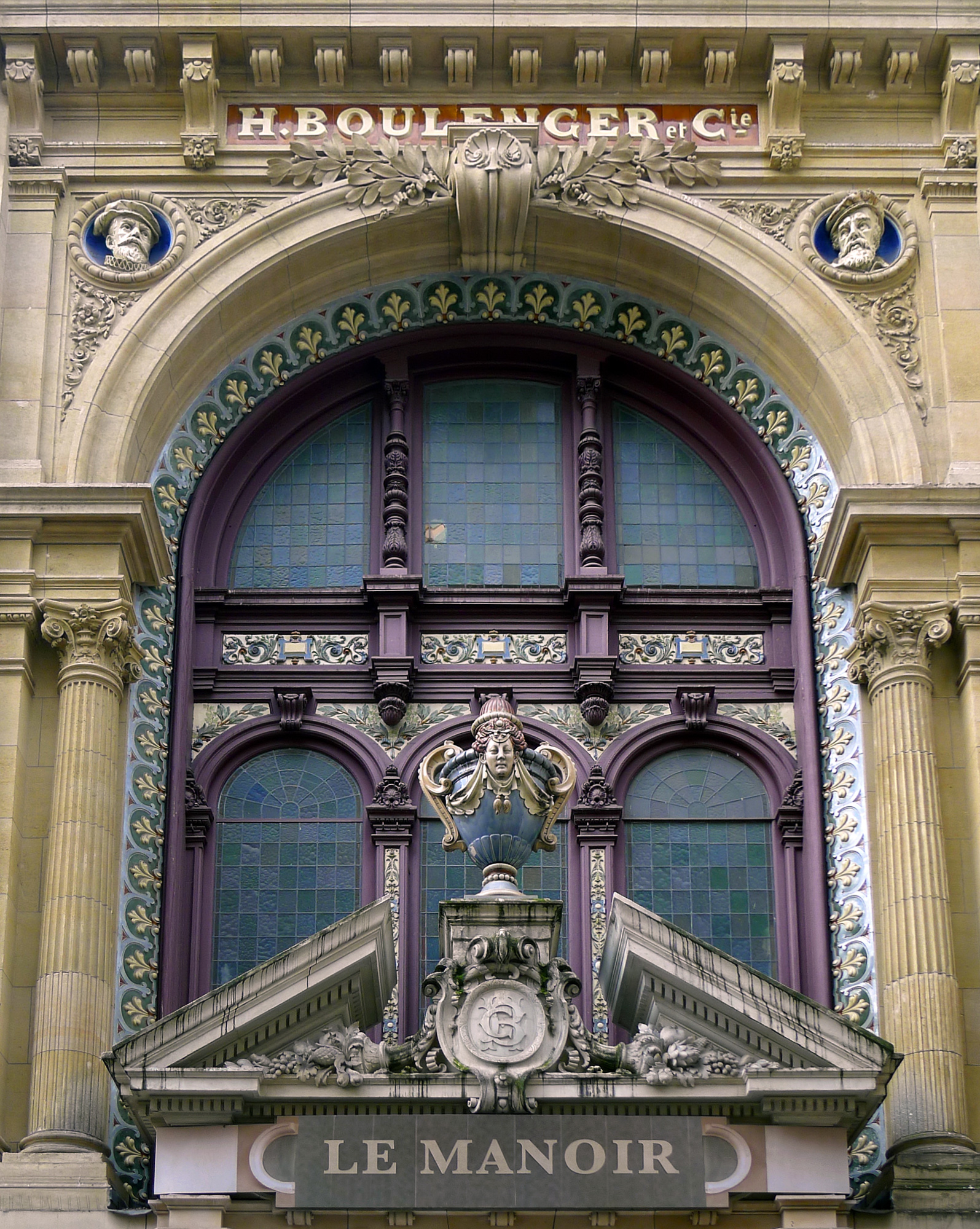 Rue de Paradis (n°18 : entrée) - Paris X